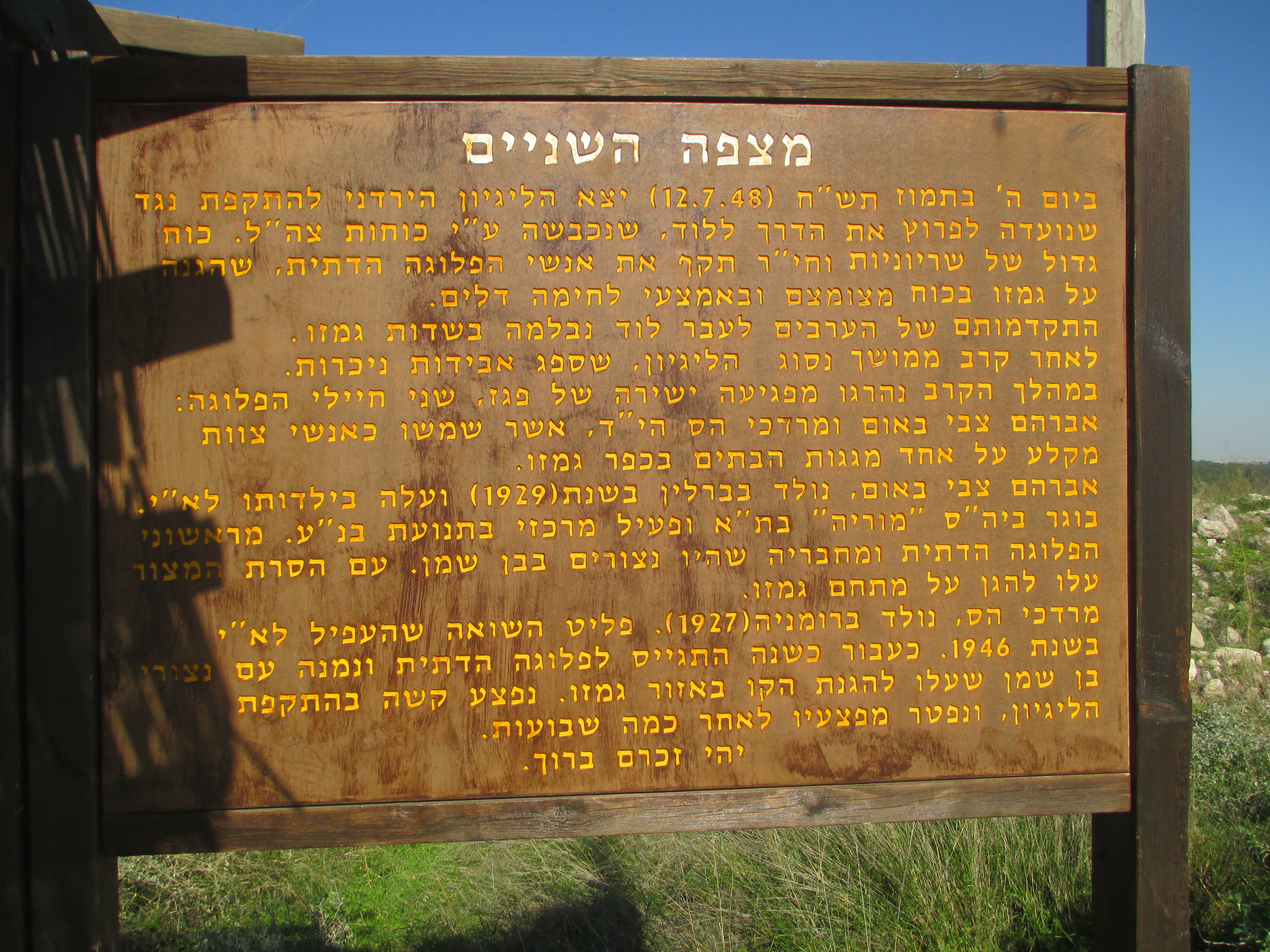 מצפה השניים בפסגת תל גמזו